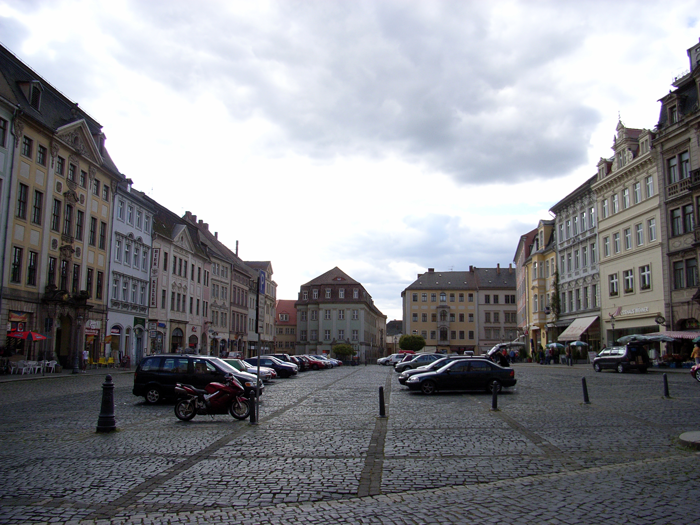 Markt in Zittau